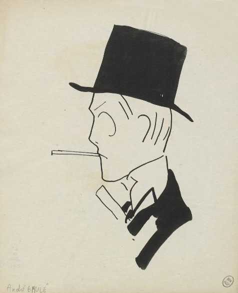 André Brulé : caricature